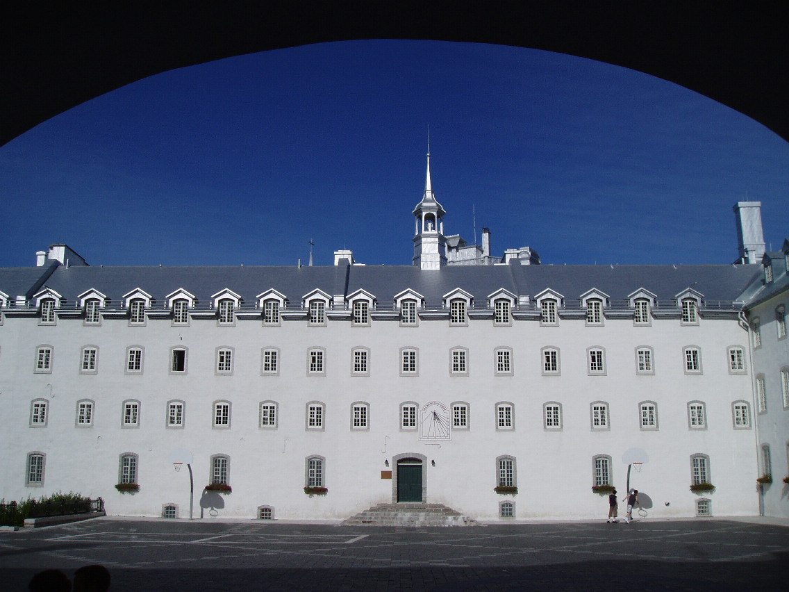 Das ehemalige Priesterseminar in Québec, Kanada liegt mitten im Stadtzentrum. Sein Innenhof bietet eine Oase der Ruhe wenige Schritte neben dem Verkehrschaos.